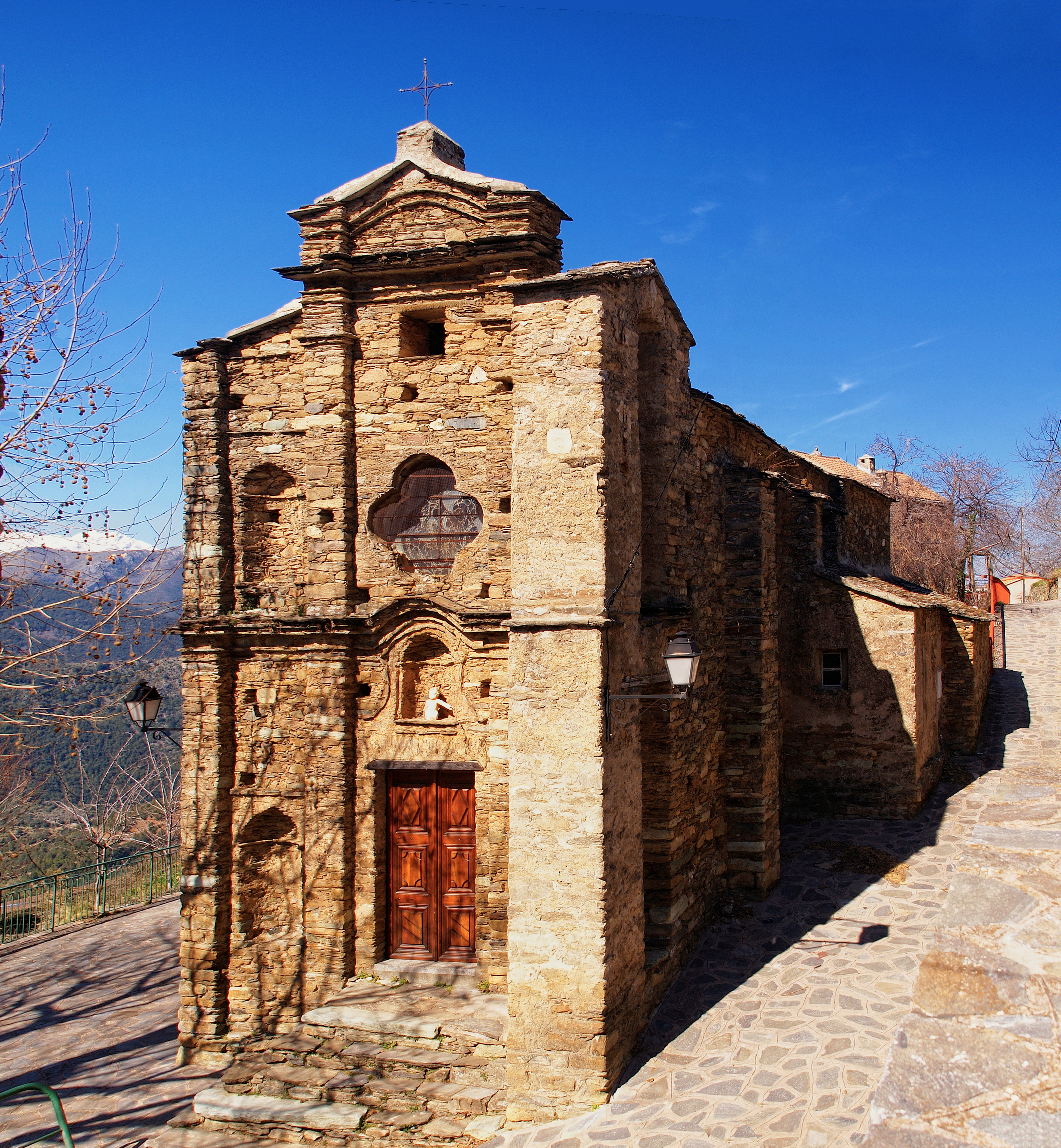 Cambia - Eglise Santa Catalina de Loriani